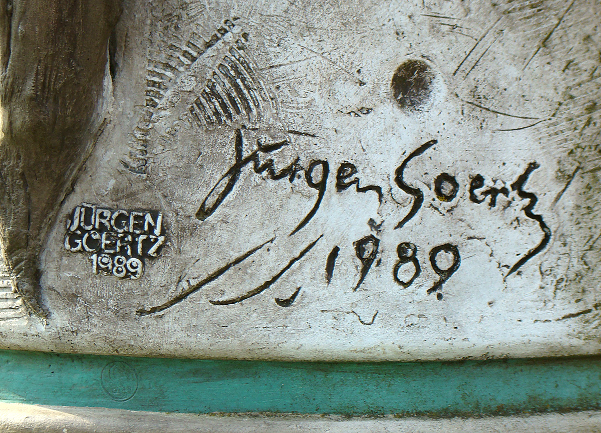 Künstlersignatur an einer Skulptur von Jürgen Goertz in Angelbachtal-Eichtersheim